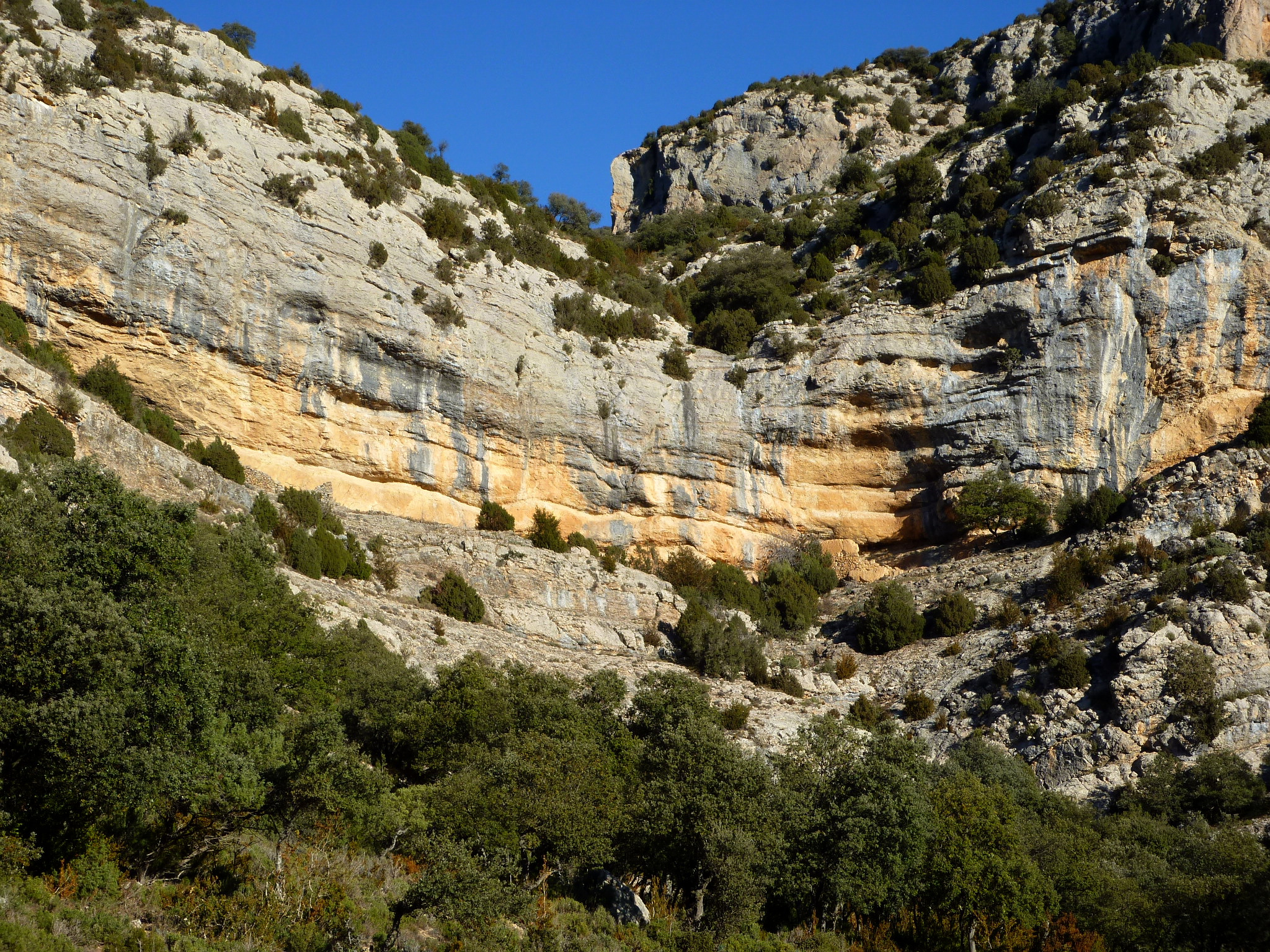 Castell de la Fabregada a la cova de les Monges (Vilanova de Meià): és a la franja rogenca del centre del cingle